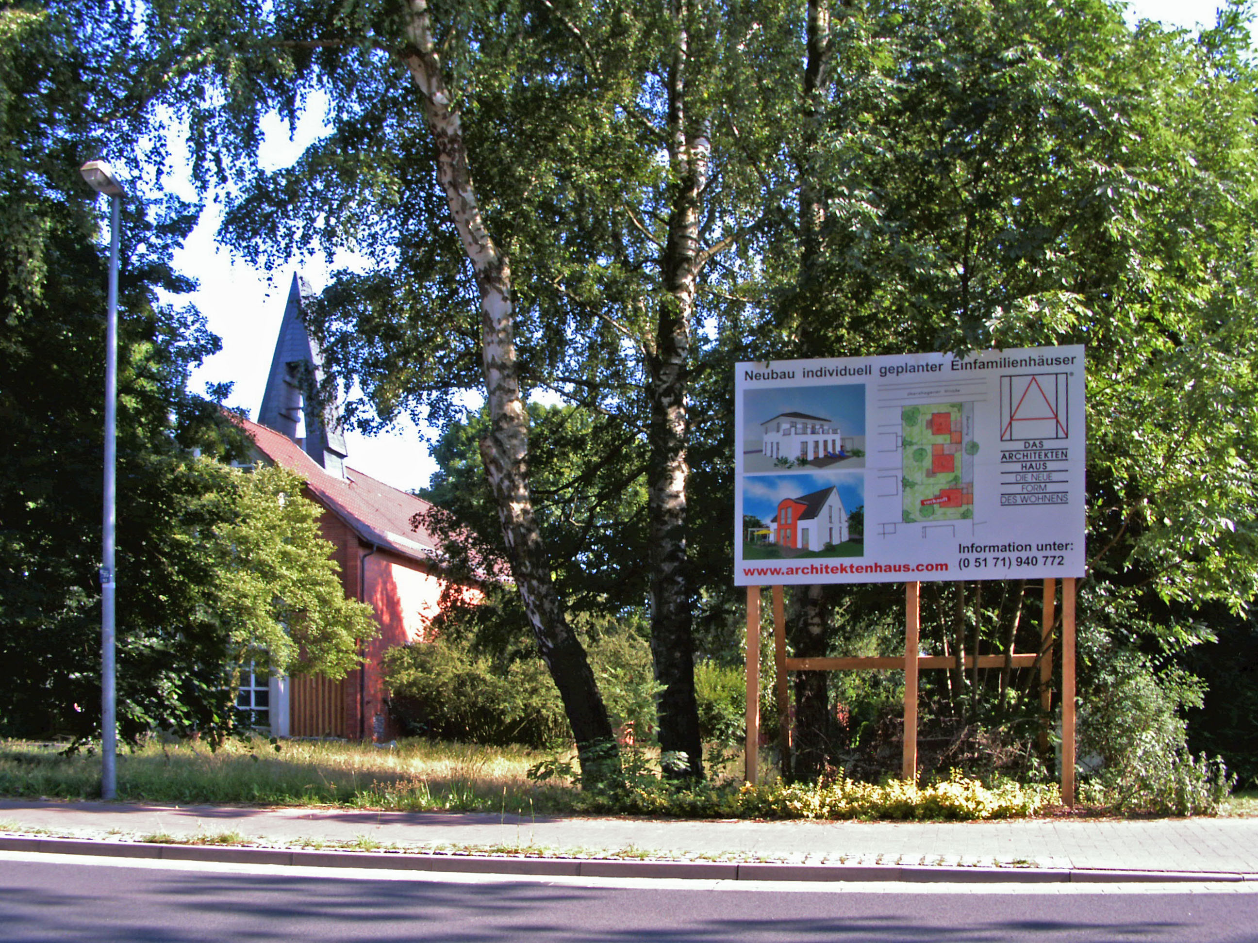 Ehemalige katholische Kirche St. Barbara in Hänigsen, Ortsteil von Uetze.